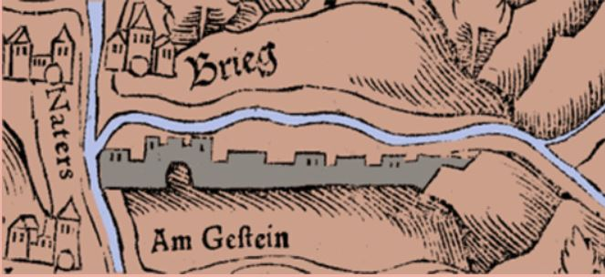 Schalbetterkarte 1536, Ausschnitt: Brig VS, Schweiz